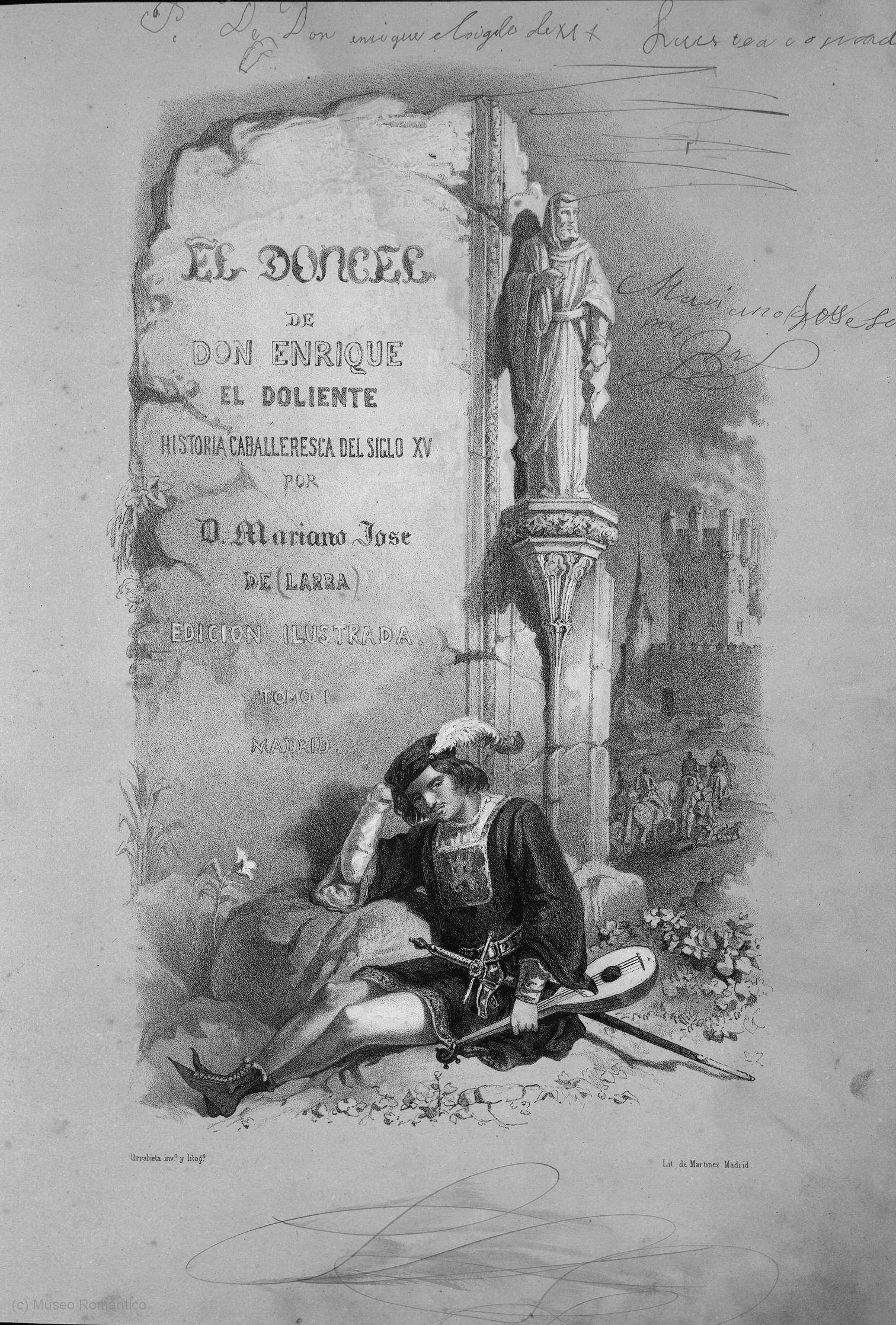 Portada de El doncel de don Enrique el doliente (tomo I).